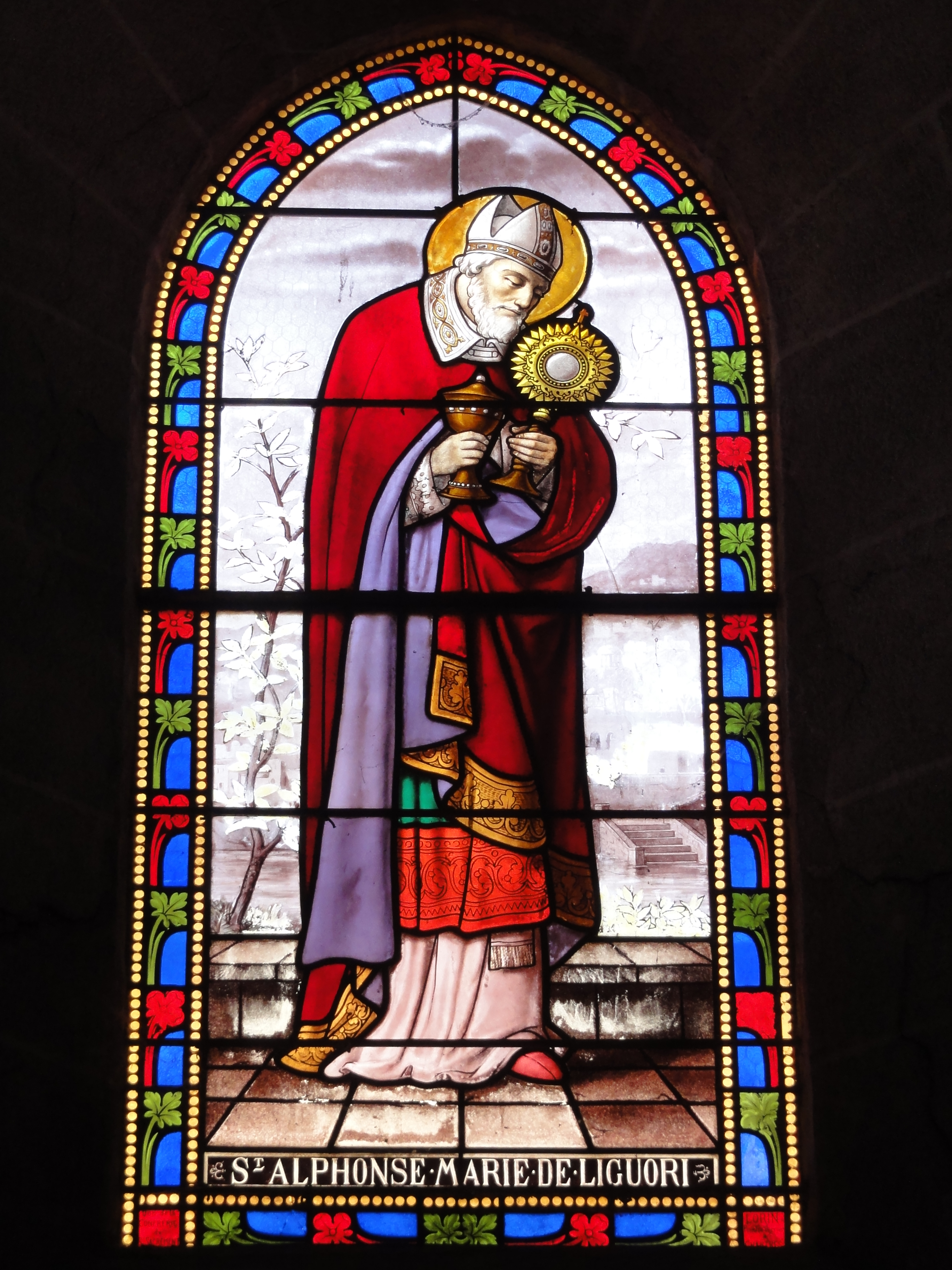 Église de Toury, vitrail par Lorin